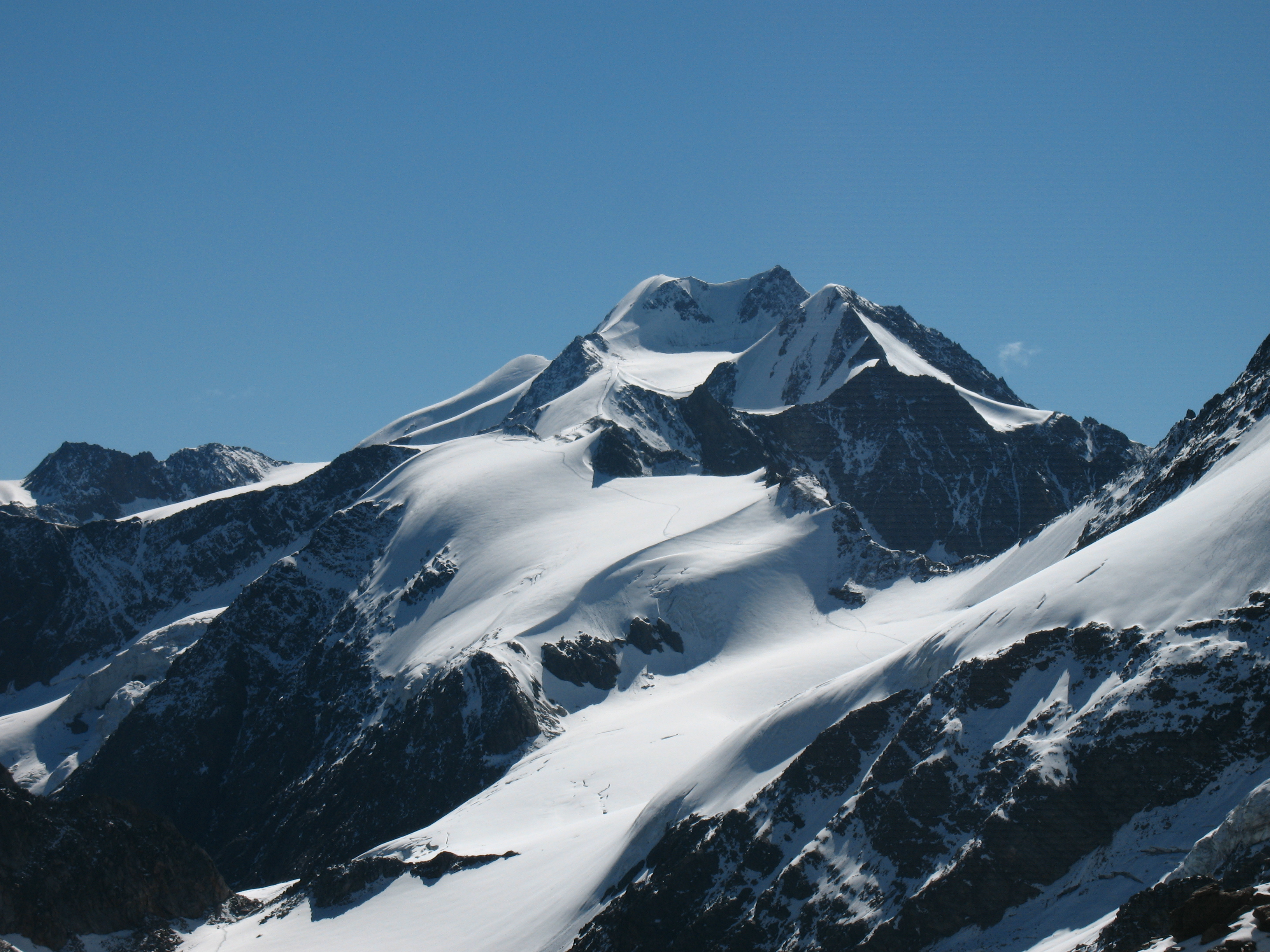 Blick vom Aufstieg zur Hinteren Ölgrubenspitze nach Osten zur Wildspitze (3768 m), davor der Hintere Brochkogel (3628 m) und die Petersenspitze (3472 m). Im Vordergrund der Sexegertenferner bis zum Urkundsattel (3060 m), ab dem der Taschachferner beginnt.